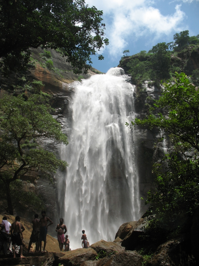 Kolli Hill Aagaya Gangai Fall Template:வார்ப்புரு:GFDL